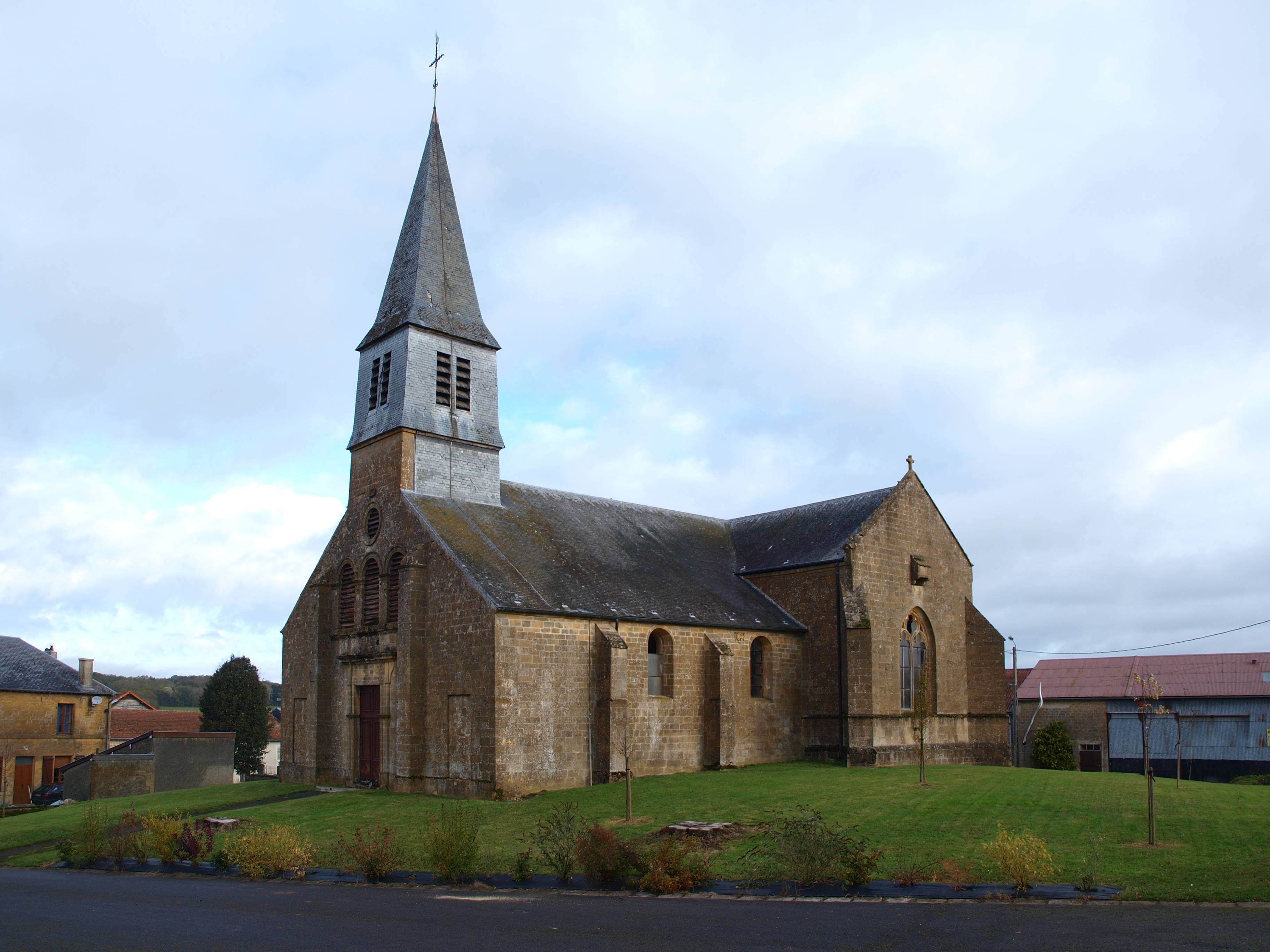 Belleville-et-Châtillon-sur-Bar (Ardennes, France) ; village de Châtillon-sur-Bar ; l'église